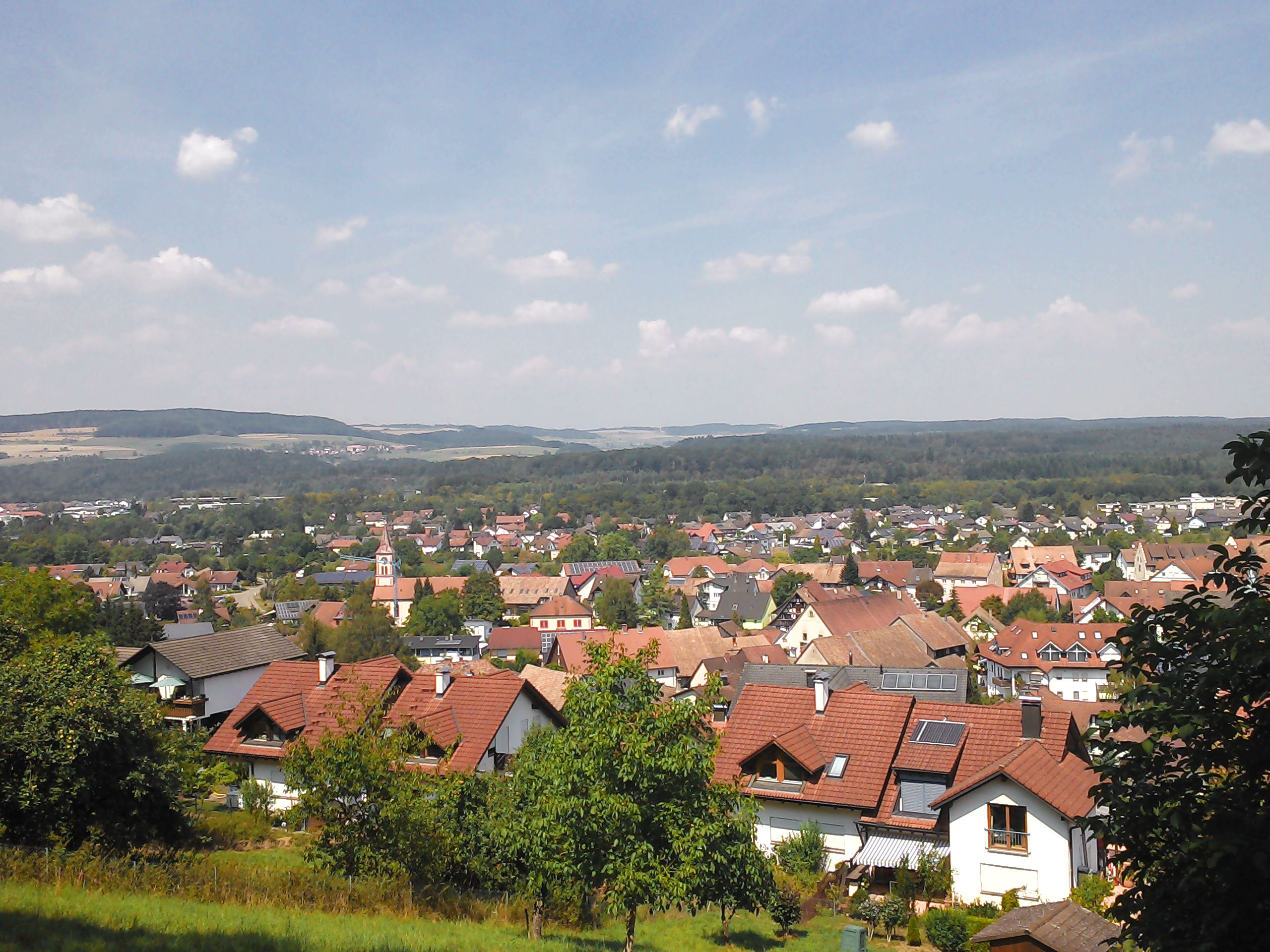 Lauchringen, Gemeinde im Landkreis Waldshut in Baden Württemberg. Blick auf den heutigen Teilort Oberlauchringen (OL).